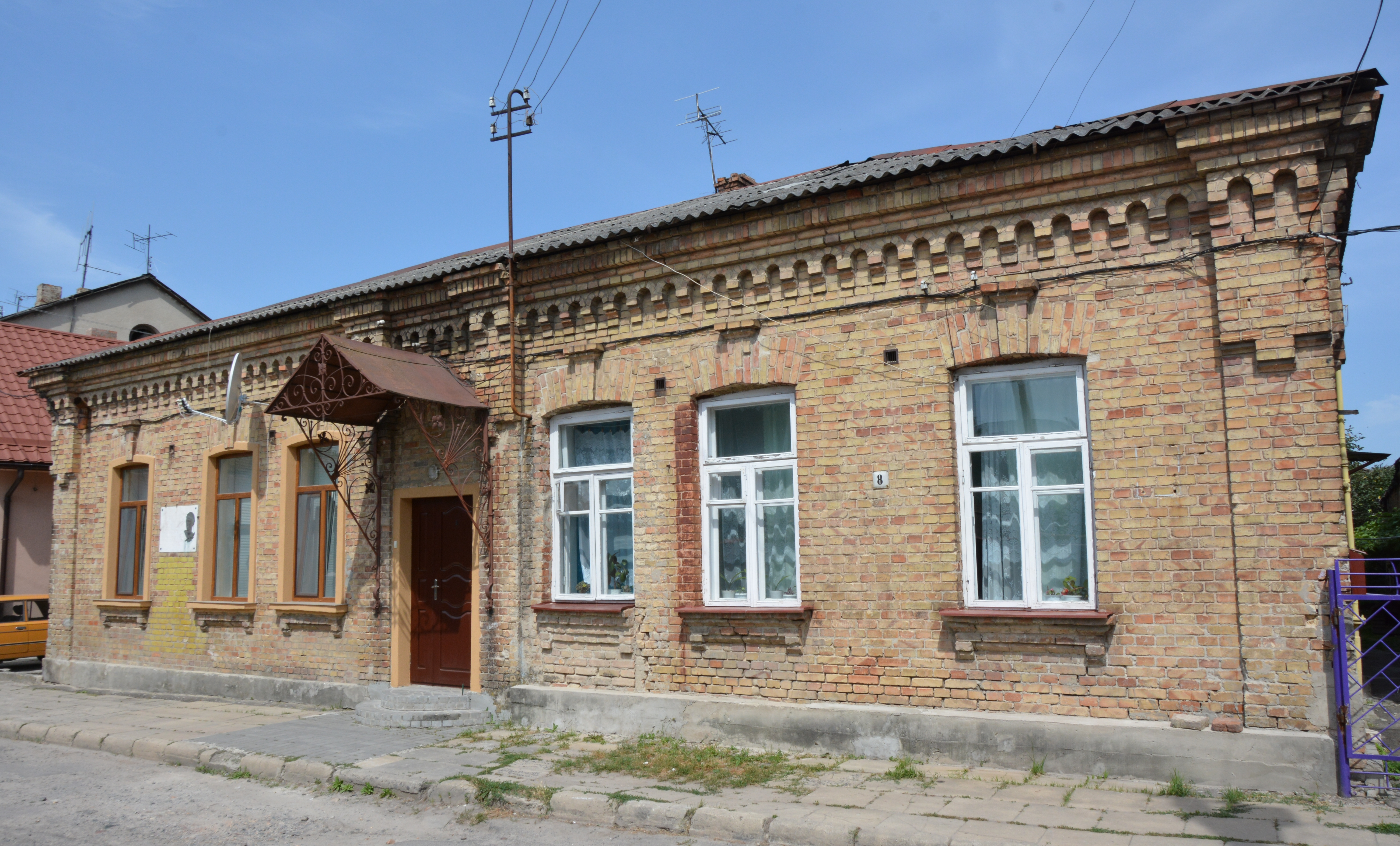 Житловий будинок, в якому жила П.Савельєва (мур.), Луцьк, вул. Галшки Гулевичівни, 8 (кол. П.Савельєвої)